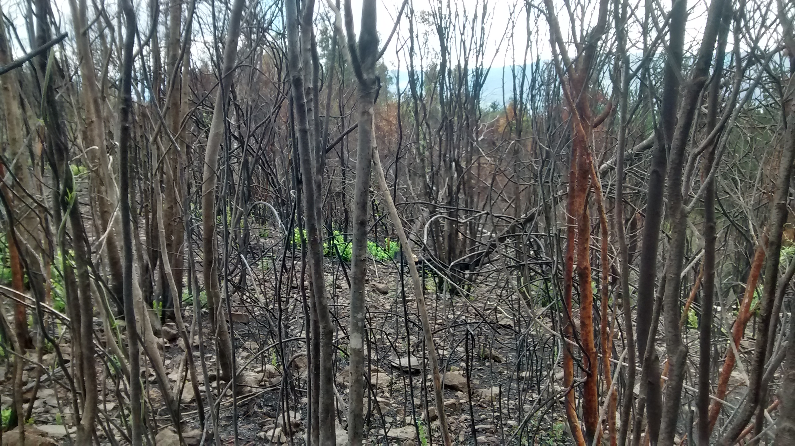 Porción de bosque nativo quemado tras el megaincendio del verano del 2017